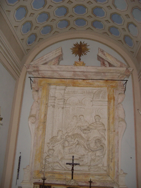 Sant'Antonino (Antonino Pierozzi) risuscita un fanciullo da Filicaja